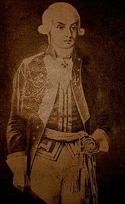 Ο Ραέφσκι διοικητής